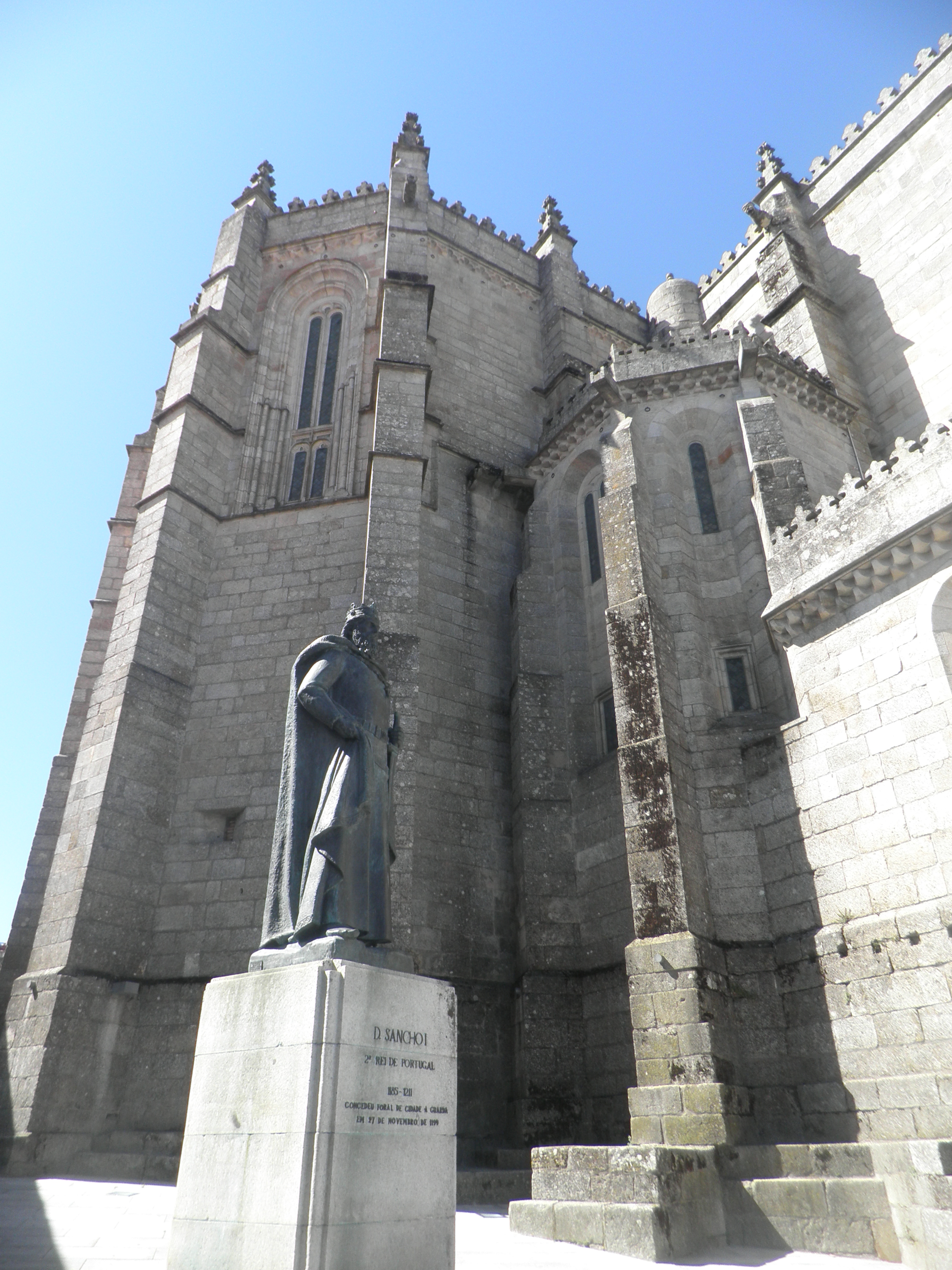 A estátua do rei povoador encontrava-se no centro da Praça Velha. Foi mudada para este recanto, aquando da intervenção na dita Praça e à volta da Catedral. Nem todos concordaram/concordam com o lugar que lhe foi destinado.